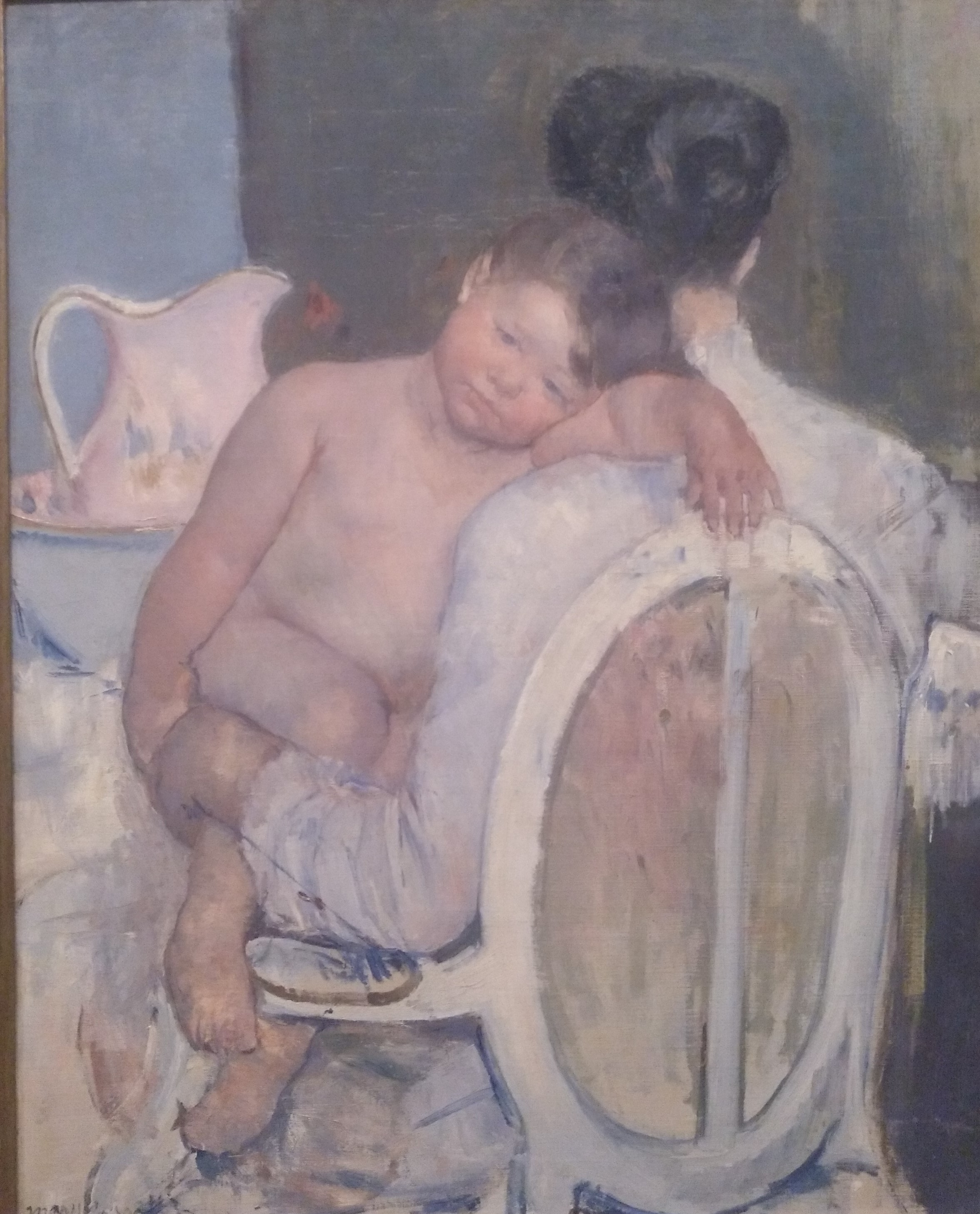 Olio mihise gainean, 81 x 65,5 cm. Bilboko Arte Ederren Museoan.